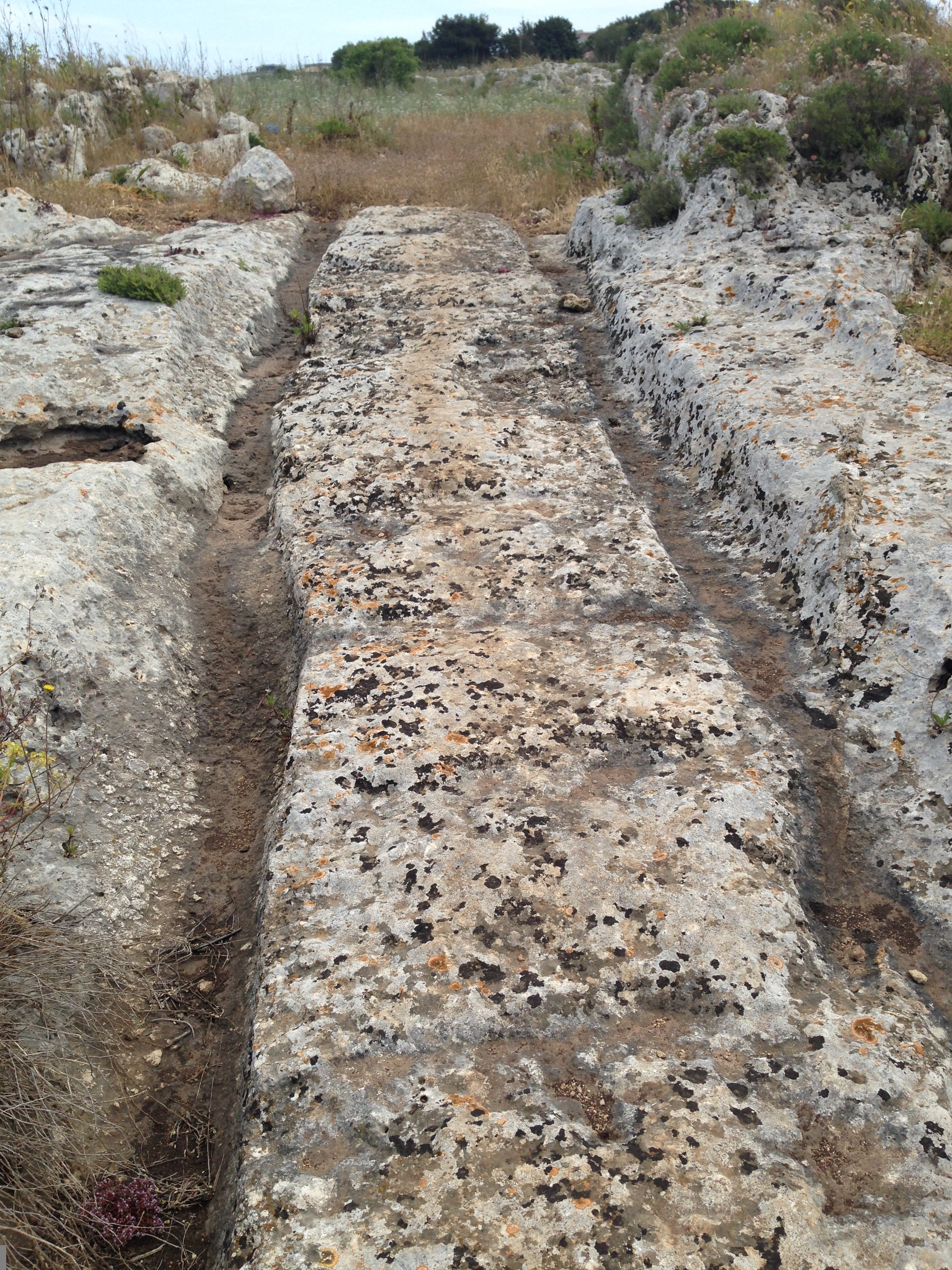 Porta urbica nord di Siracusa. Accesso storico alle mura dionigiane dalla zona Targia a Scala Greca